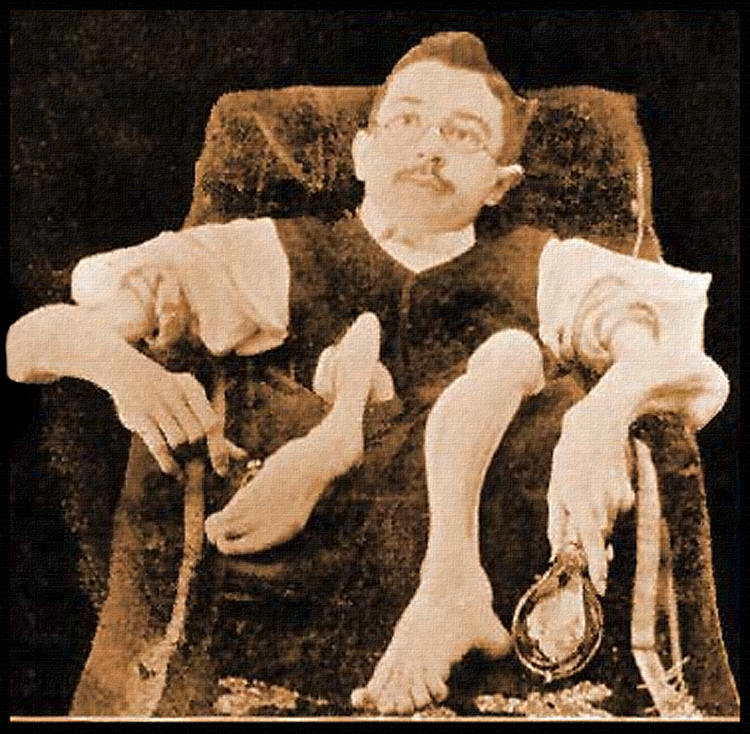 Der "durchsichtige" Count Orloff (Ivannow Wladislaus von Dziarski-Orloff)